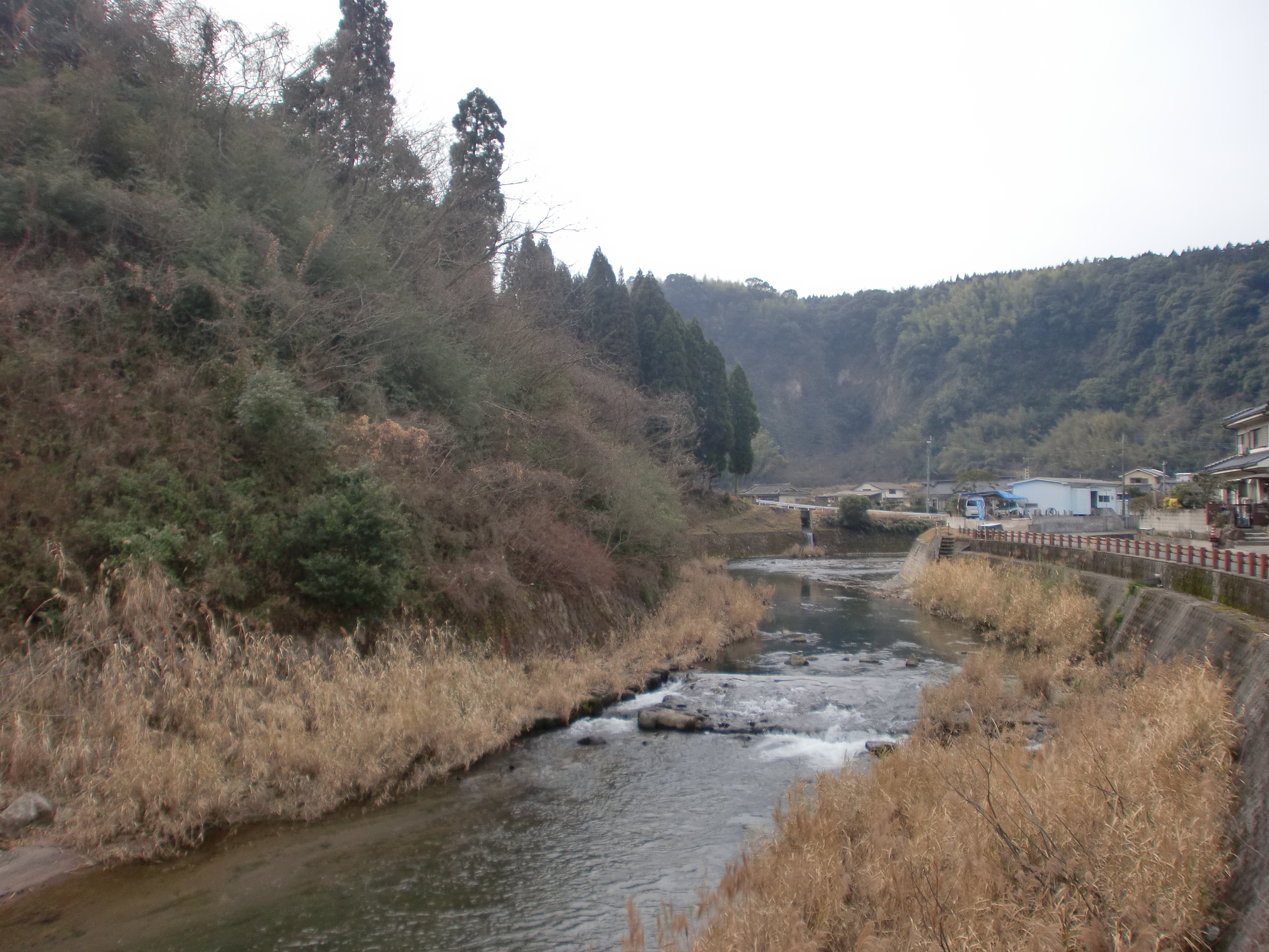 鹿児島県鹿児島市を流れる甲突川（鹿児島市小山田町から上流方向を撮影）